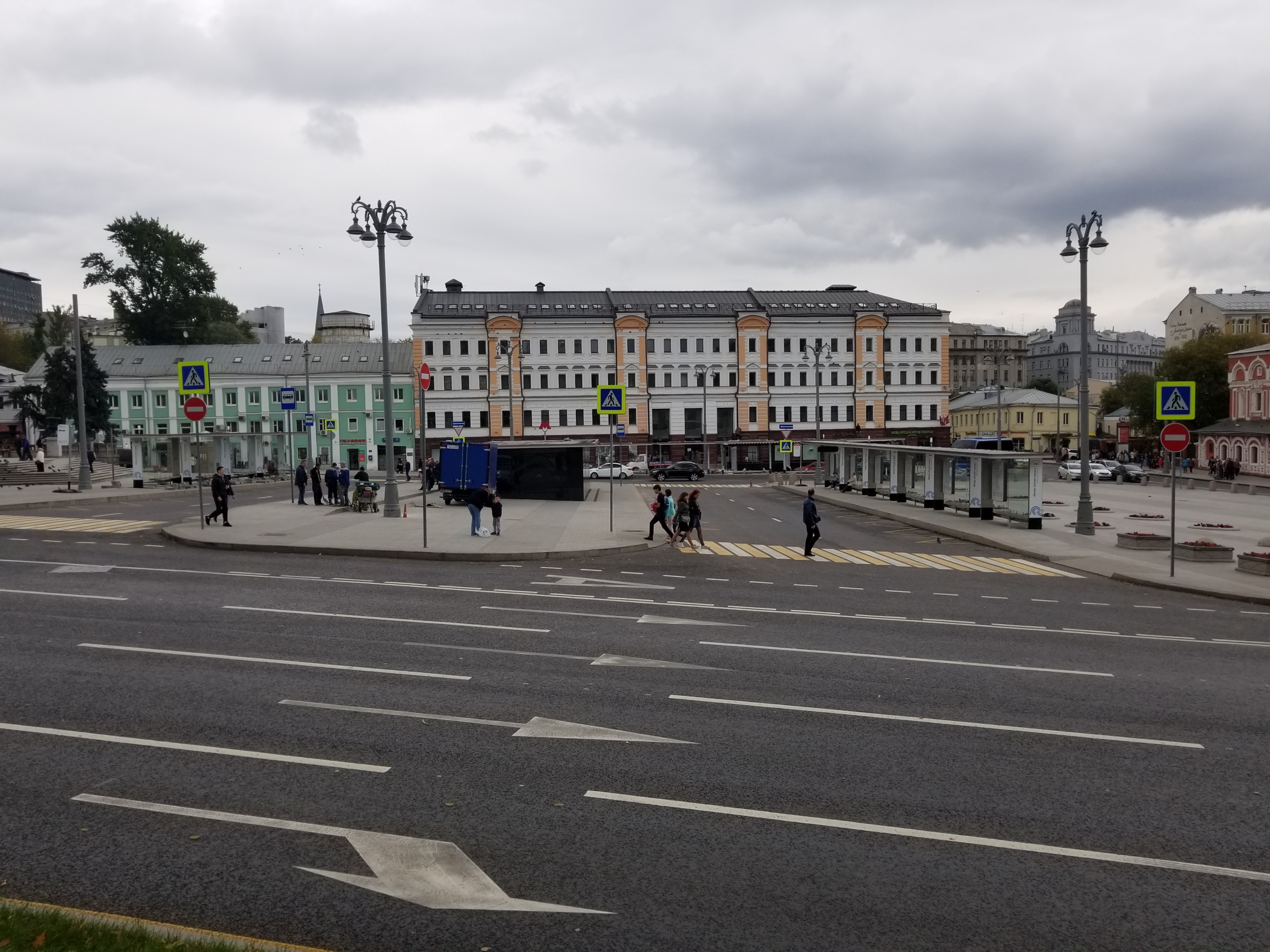 Славянская площадь (сентябрь 2017)